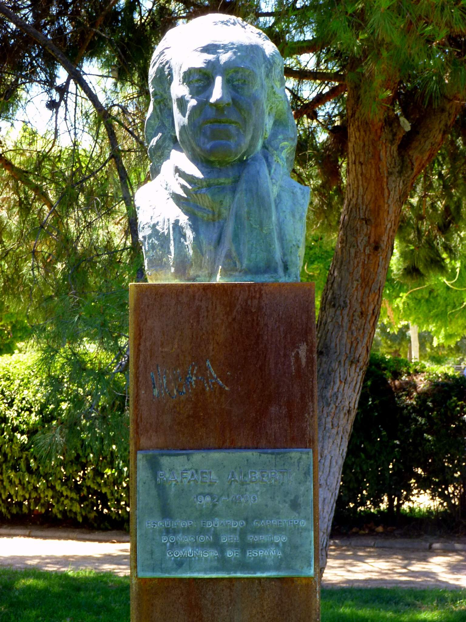 Leganés - Monumento a Rafael Alberti